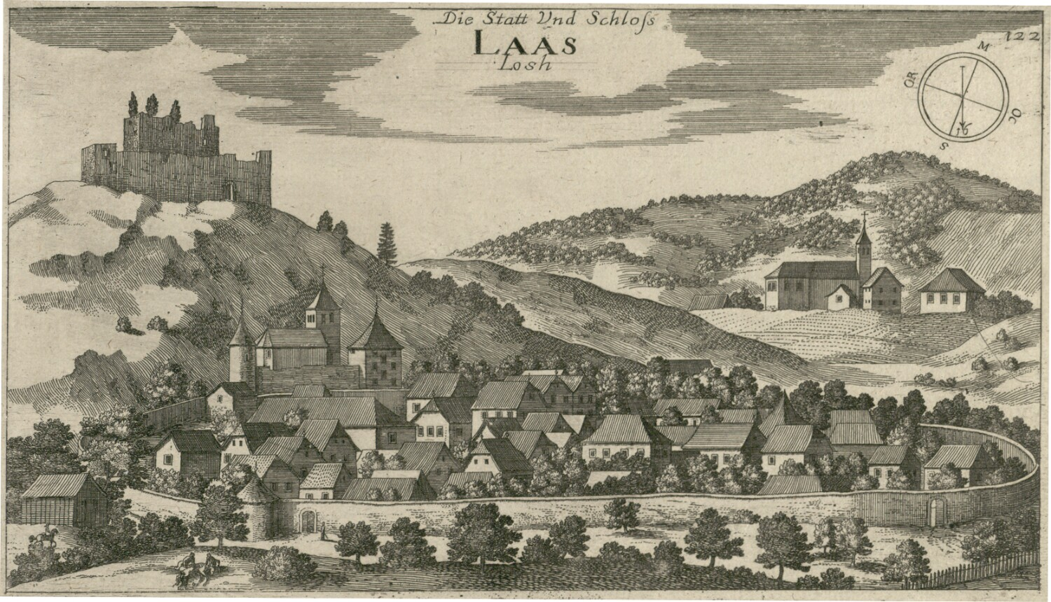 Mesto in grad Lož